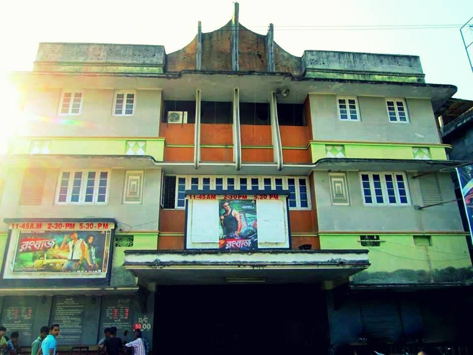 Mayapuri Cinema, Bongaigaon, Assam, India